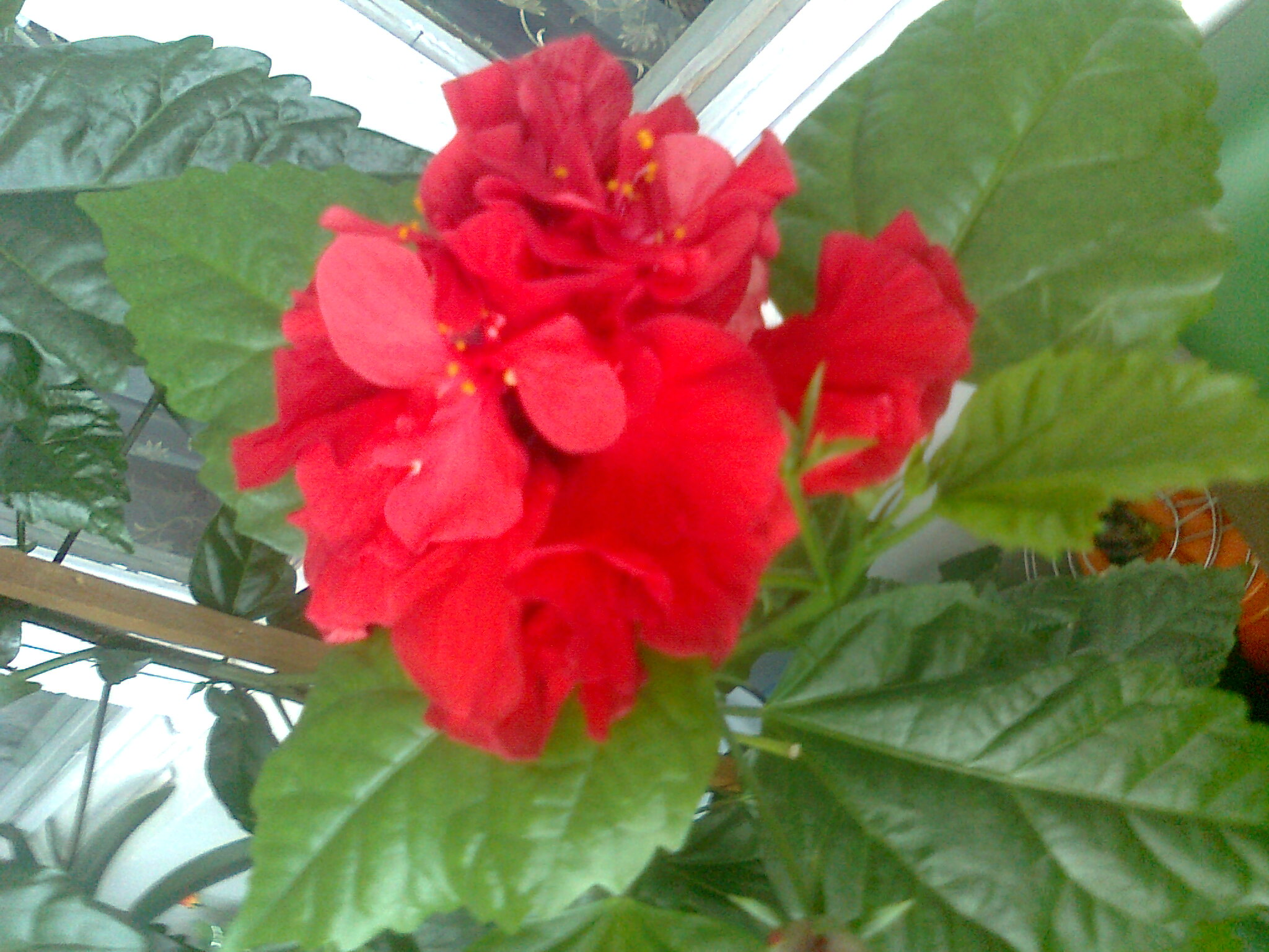 Չինական վարդ